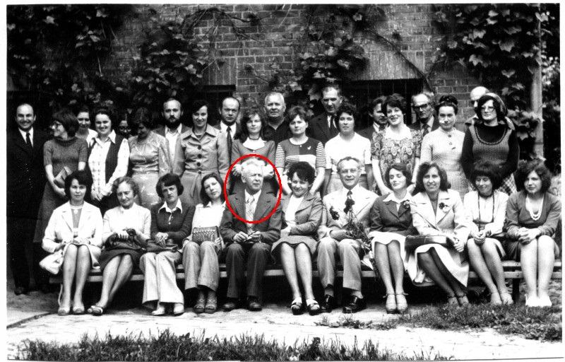 Teodora Elasa i innych nauczycieli